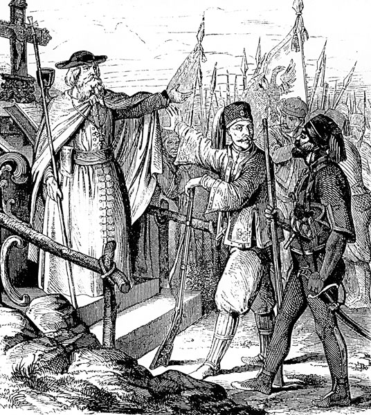 Архимандрит Милентије храбри народ на борбу